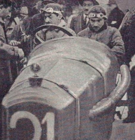 André Boillot vainqueur de la Targa Florio 1919.